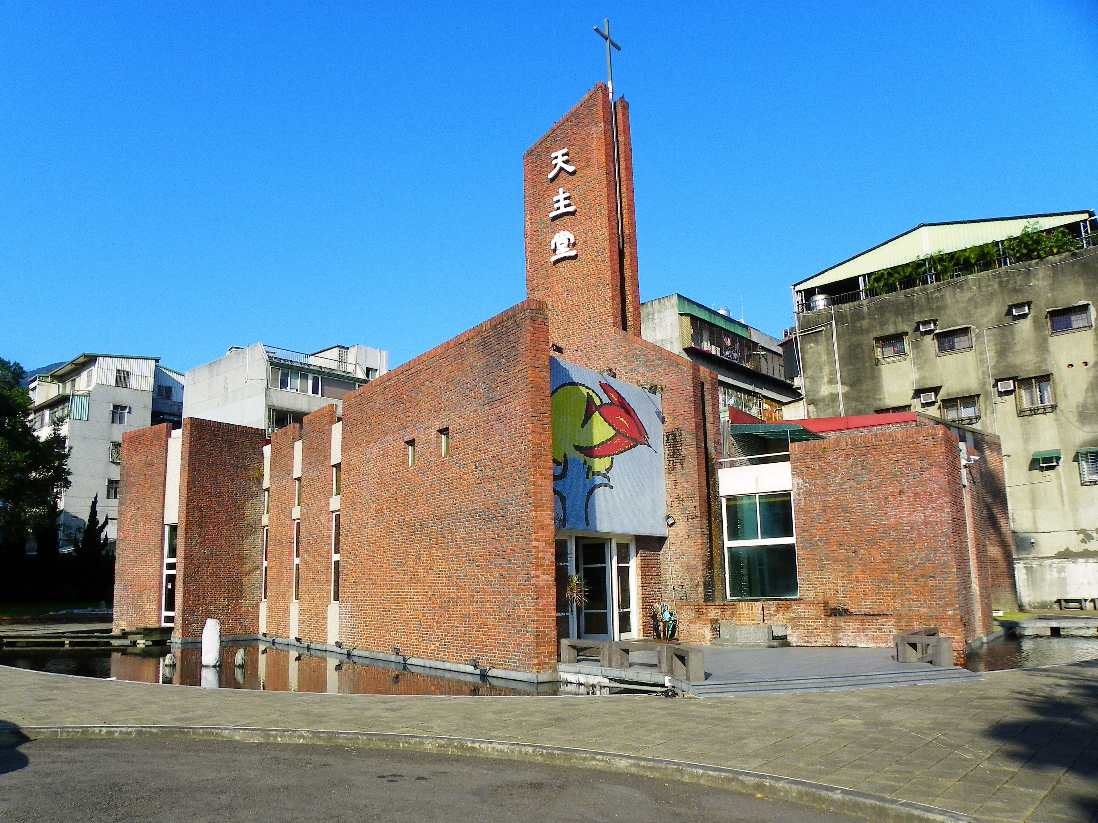 聖高隆邦天主堂，地址：臺北市北投區大業路695號。